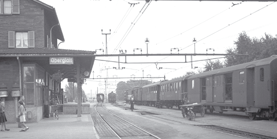 Bahnhof Oberglatt am 29.9.1951, rechts Zug 4638 Schaffhausen–Zürich, im Hintergrund eine Eb 3/5, die für den Zug Richtung Dielsdorf rangiert. Das Dielsdorfer Gleis, von dem bei allen Verbindungen Richtung Zürich umgestiegen werden musste, ist Gleis 4, rechts hinter dem Zug auf Gleis 3.